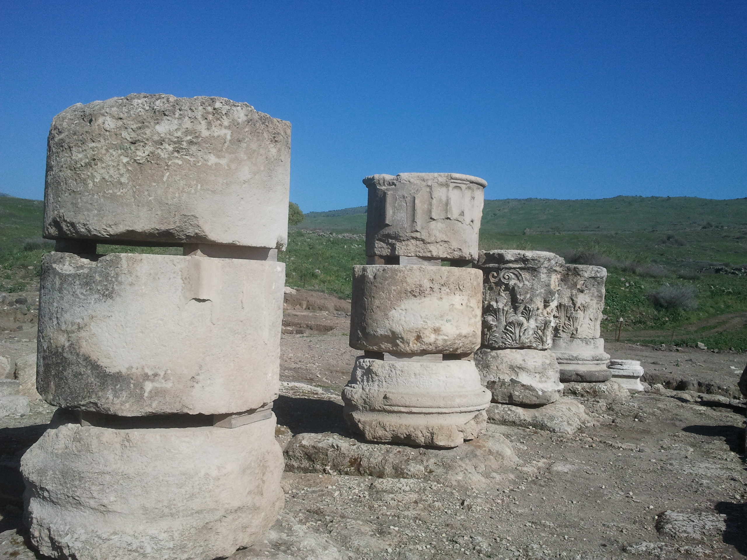 חורבת עומרית הוא אתר ארכאולוגי שבו שרידי מקדש רומי שבנה הורדוס לכבודו של המלך אוגוסטוס בבניאס. האתר שוכן למרגלות הגולן, ליד היישוב שאר ישוב